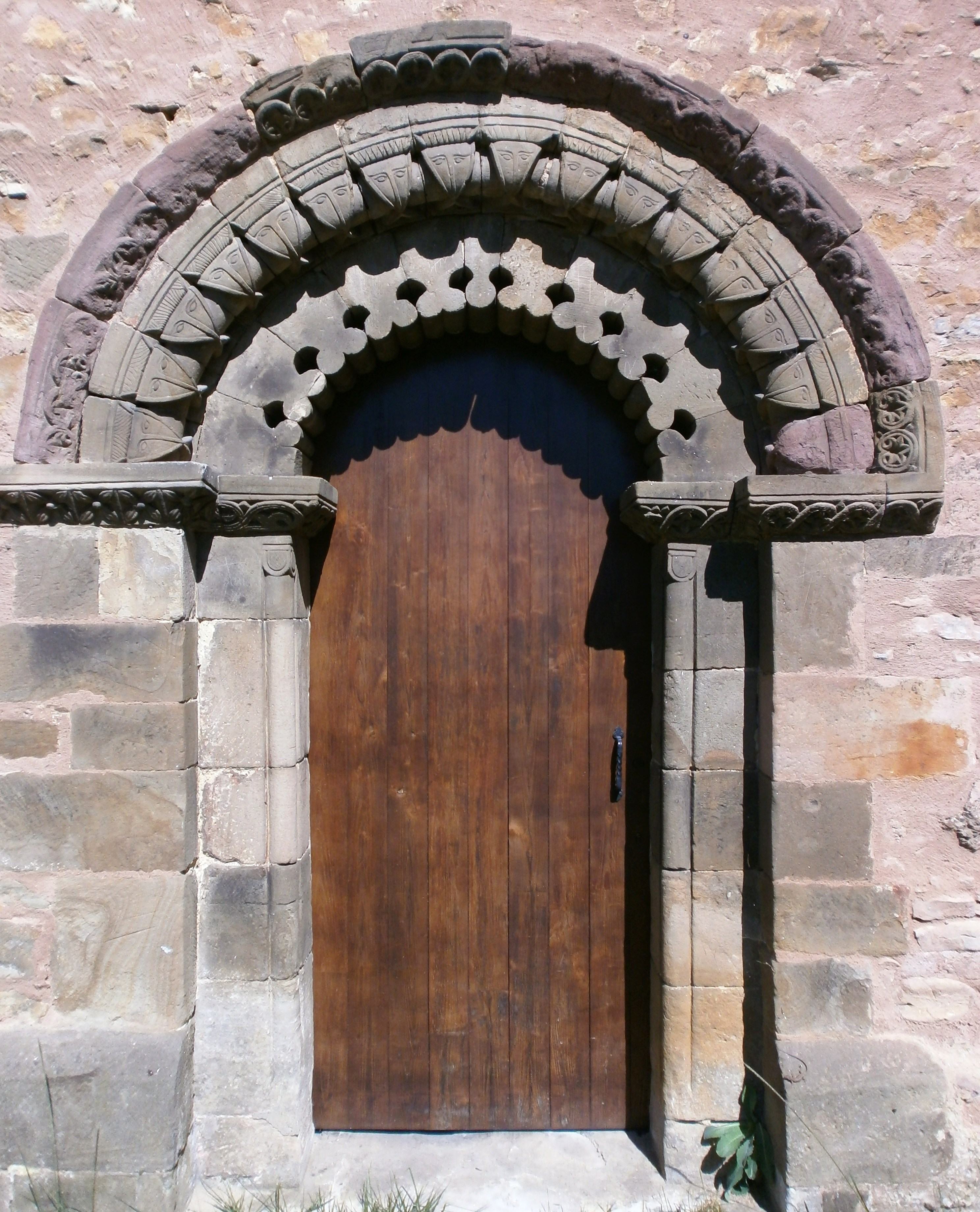 Iglesia de San Esteban. Pórtico de entrada-3